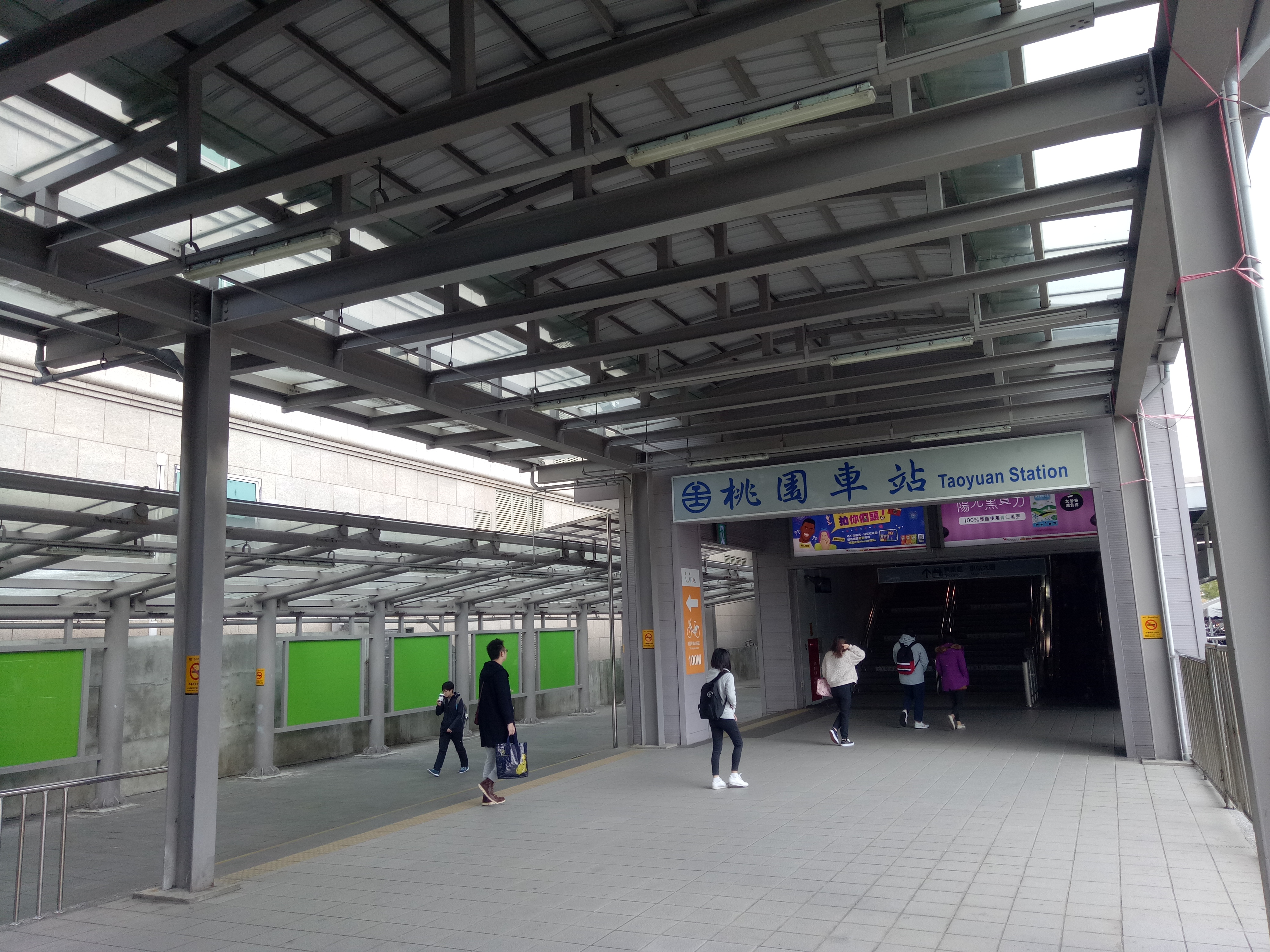 桃園臨時站位於原前站的出口（中正路、大同路方向）